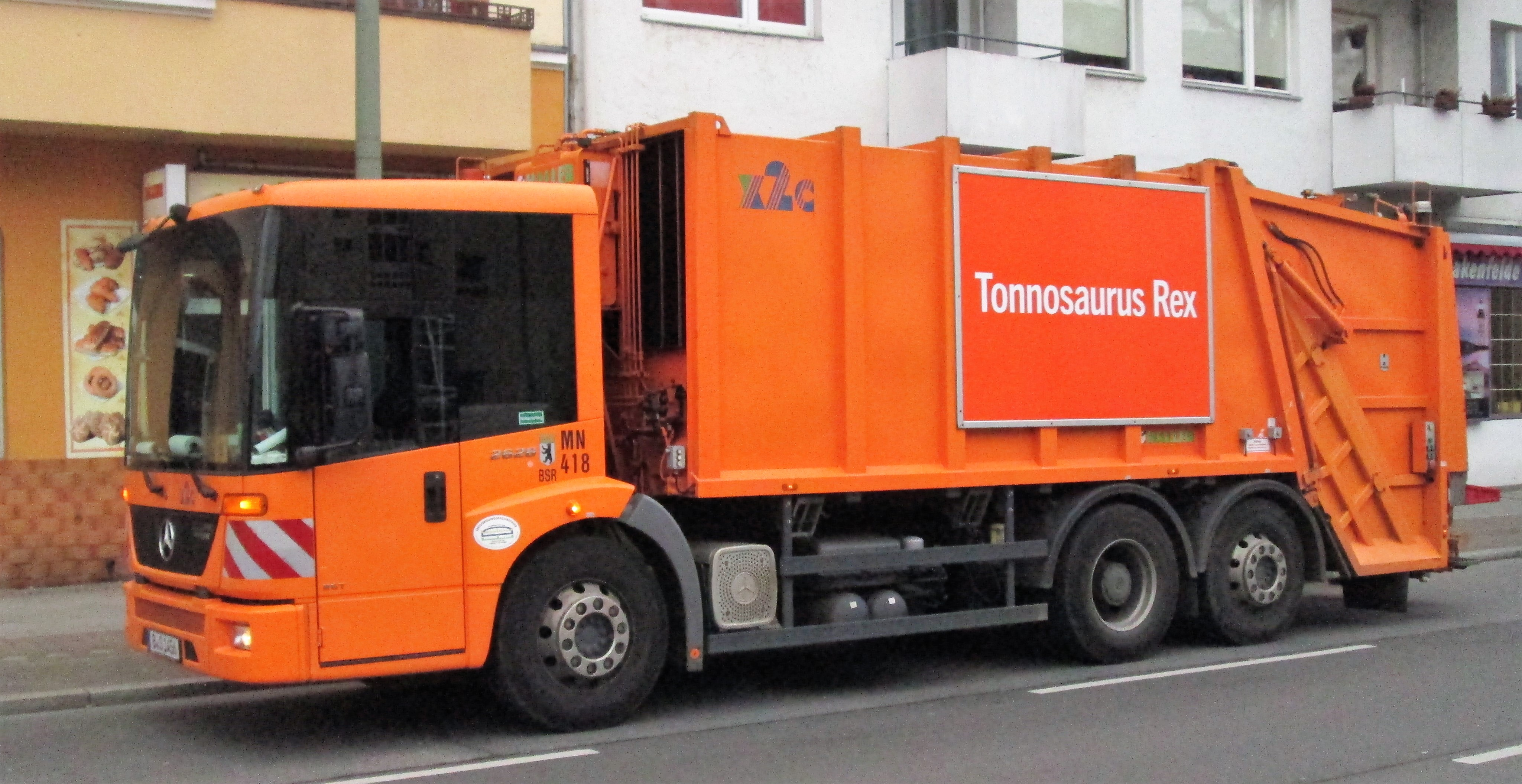 Abfallsammelfahrzeug der Berliner Stadtreinigungsbetriebe, Aufschrift „Tonnosaurus Rex“